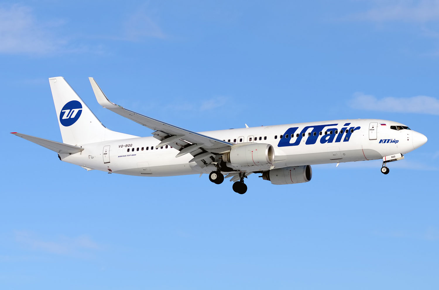 boeing-737-800